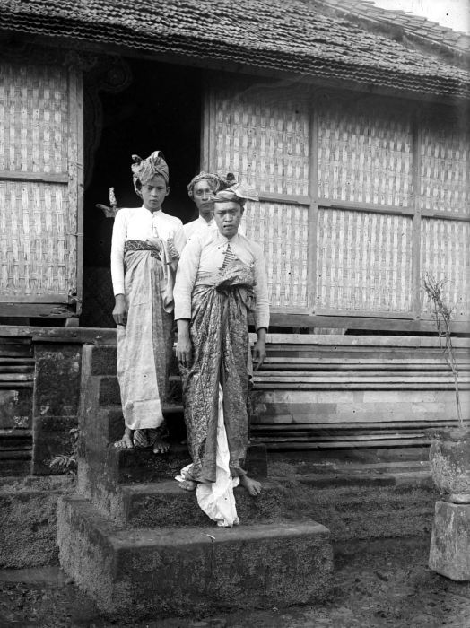 Negatief. Portret van de punggawa van Marga